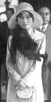 Der Bruder des Kaisers von Japan in Berlin! Prinz Takamatsu traf mit seiner Gattin zu einem inoffiziellen Besuch in Berlin ein. Unser Bild zeigt das Paar vor dem Hotel Adlon in Berlin.